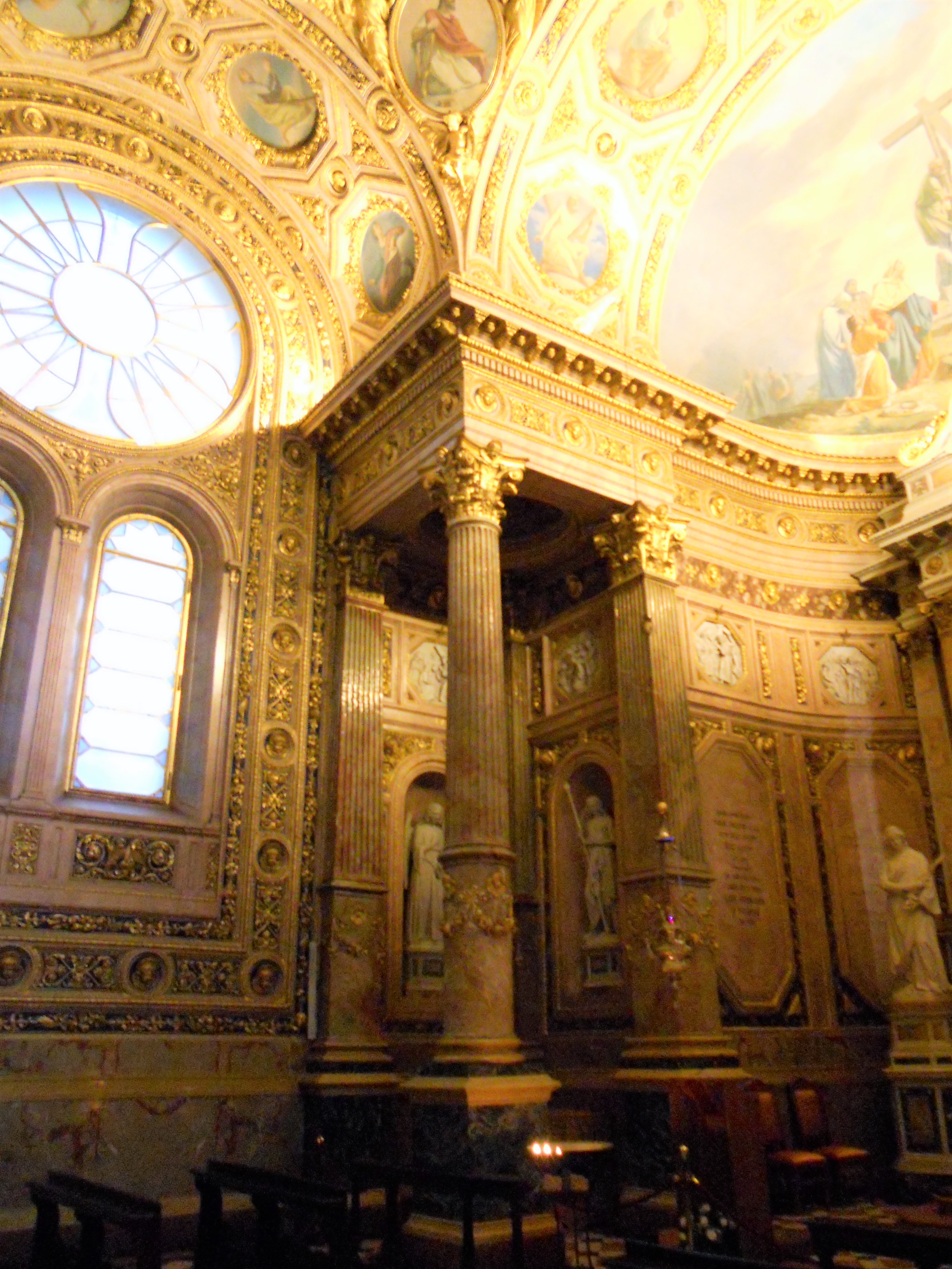 Cappella dell'Eucarestia duomo di Bergamo